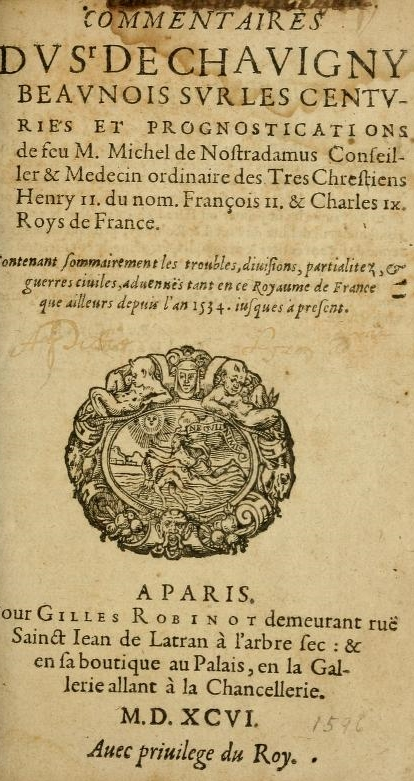 Jean-Aimé de Chavigny, Commentaires ... sur les Centuries et prognostications de feu M. Michel de Nostradamus. Title page